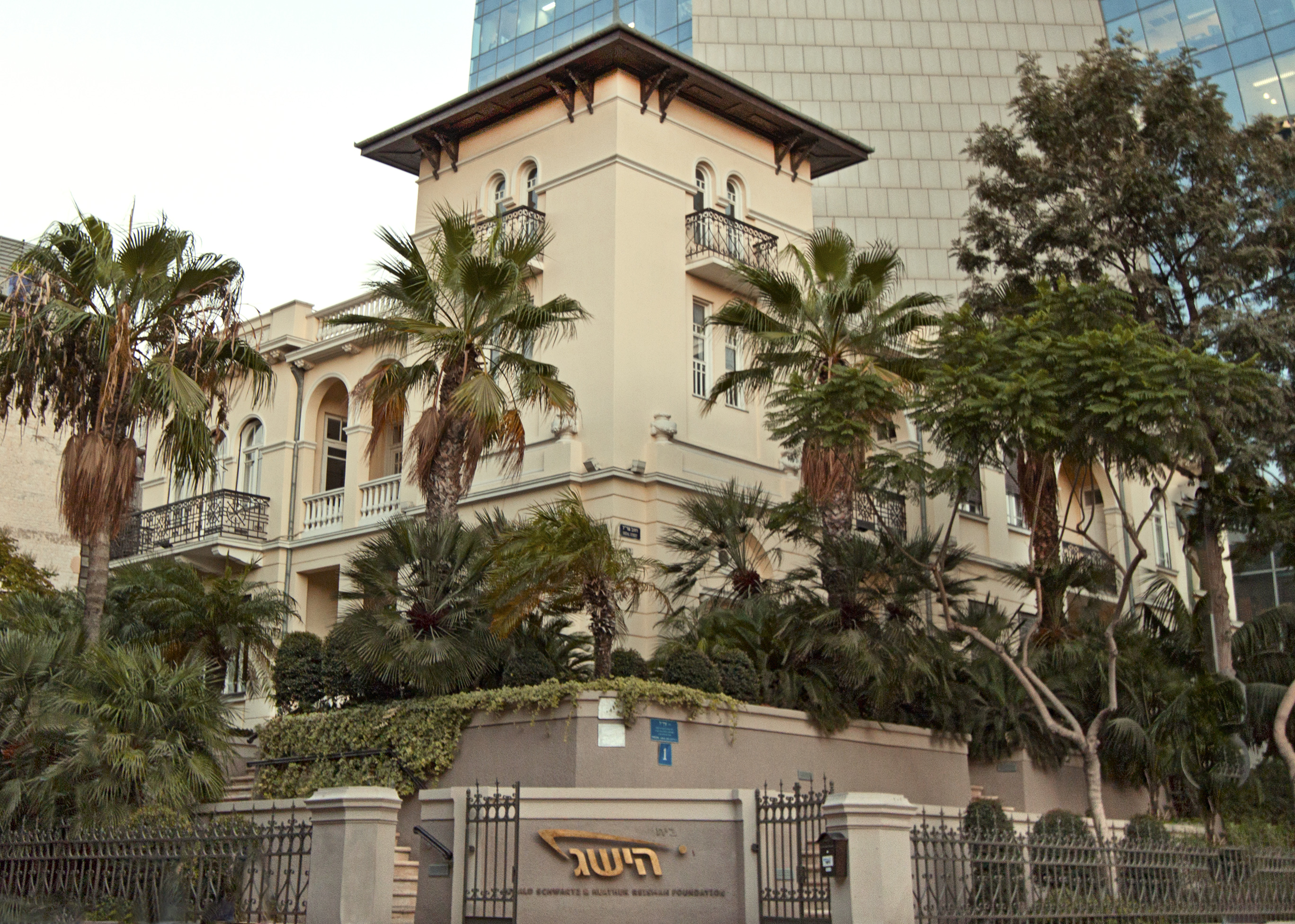 בית השגרירות הרוסית הוא מבנה היסטורי הממוקם בשדרות רוטשילד מספר 46, פינת רחוב שד"ל בתל אביב, והוא אחד מבנייניה הנודעים של העיר. הבניין מתאפיין באדריכלות של הסגנון האקלקטי הייחודי ללב תל אביב. הבית תוכנן ב־1924 על ידי האדריכל יהודה מגידוביץ', עבור משפחת לוין האמידה. הוא משופע בקישוטים וסמלים ברוח הסגנון הרומנטי, ובחזיתו פגודה. עם השנים החליף הבניין בעלים, ואחרי הקמת המדינה שכנה בו צירות ברית המועצות. ב־9 בפברואר 1953, בשעות הערב, בוצע בו הפיגוע בצירות הסובייטית שבעקבותיה ניתקה ברית המועצות את יחסיה הדיפלומטיים עם מדינת ישראל. היחסים חודשו רק לאחר מות סטלין ביולי 1953. הסגנון העיצובי אקלקטי. המעקות מעוצבים כחנוכייה, ואת החלונות מעטרים עמודים קורינתיים. על החזיתות משובצים אריחי קרמיקה צבעוניים האריחים מציגים נופים מארץ ישראל וסיפורים מן התנ"ך. בחזית הפונה לאלנבי – ציור העיר ירושלים, וכן ציון שם בעלי הבית.